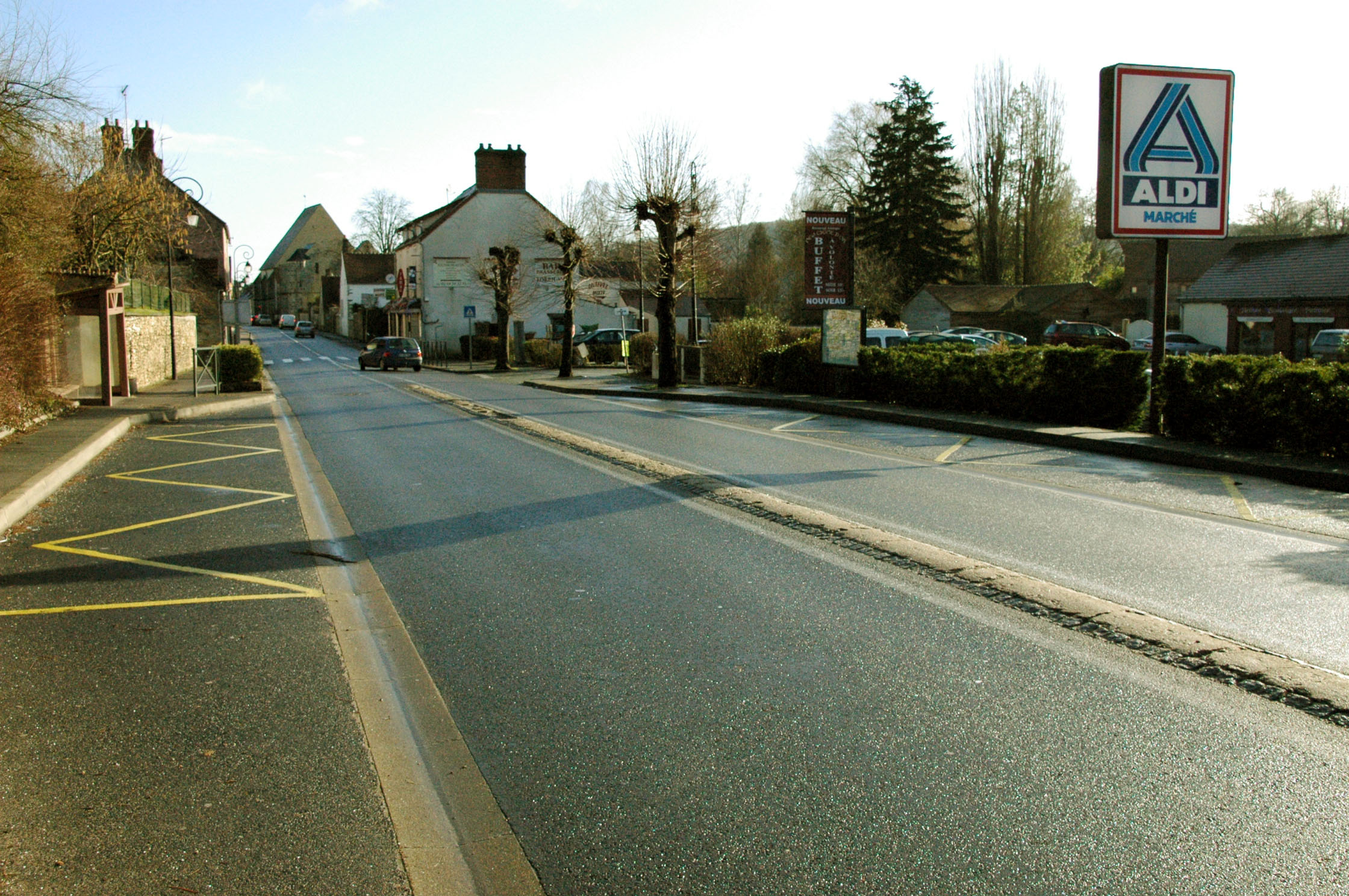 Vue prise de la RD116 en arrivant de Dourdan